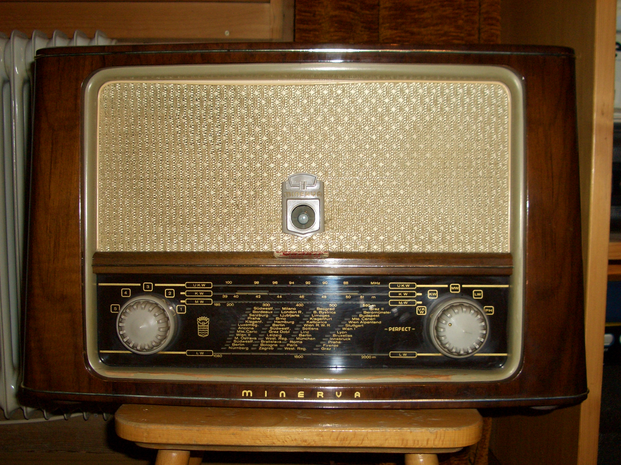 Minerva PERFECT W, Baujahr 1953.